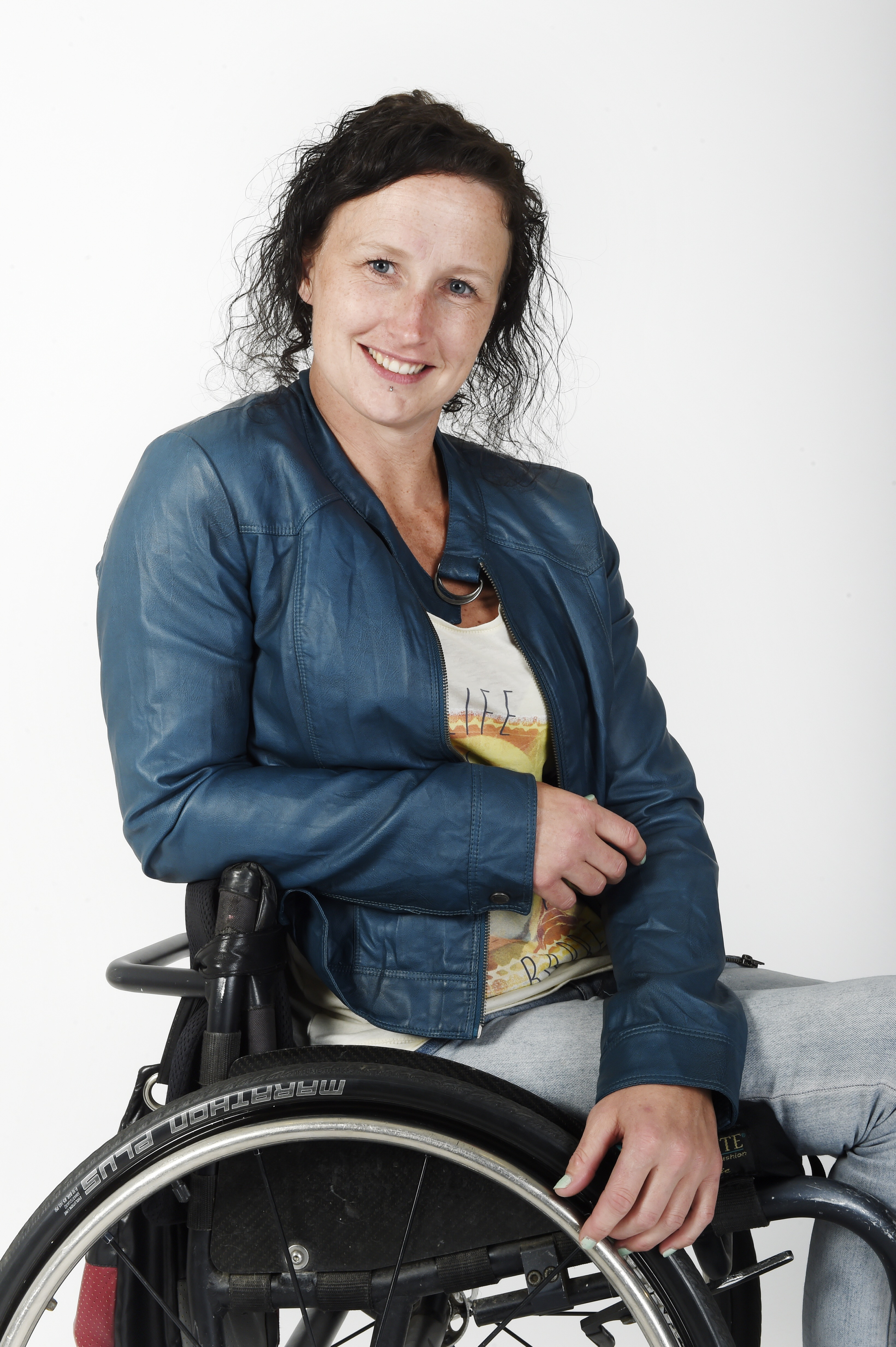 Barbara van Bergen basketbal